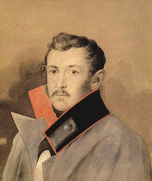 Mikhail Alexandrovich Nazimov